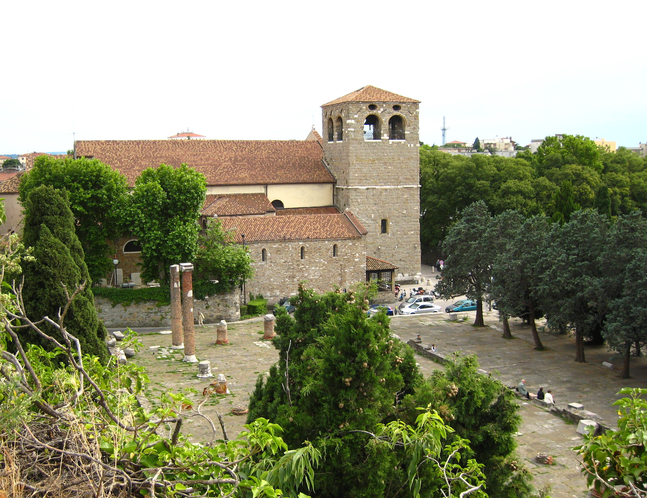 Il tozzo campanile della Basilica di San Giusto - Trieste - Giugno 2008